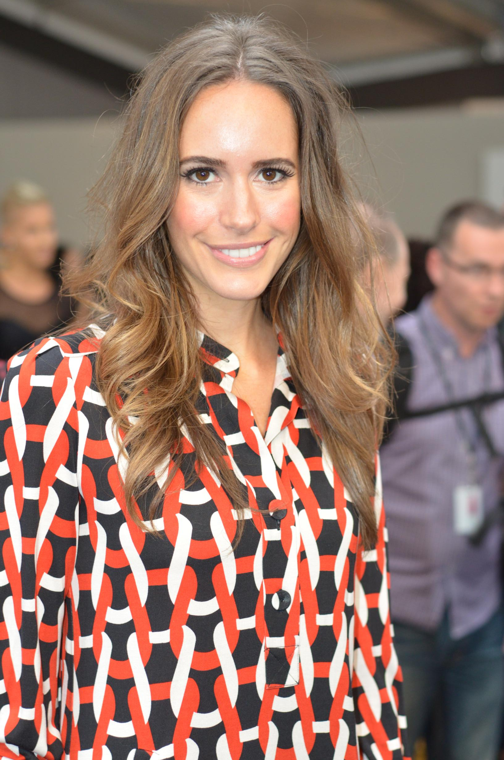 Louise Roe